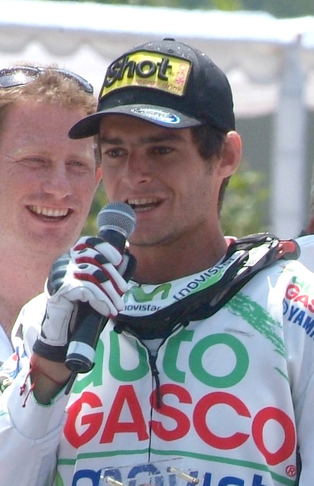 Premiación del Rally Dakar 2013